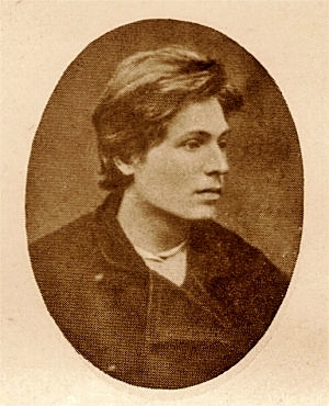 Andrej Korneevič Presnjakov